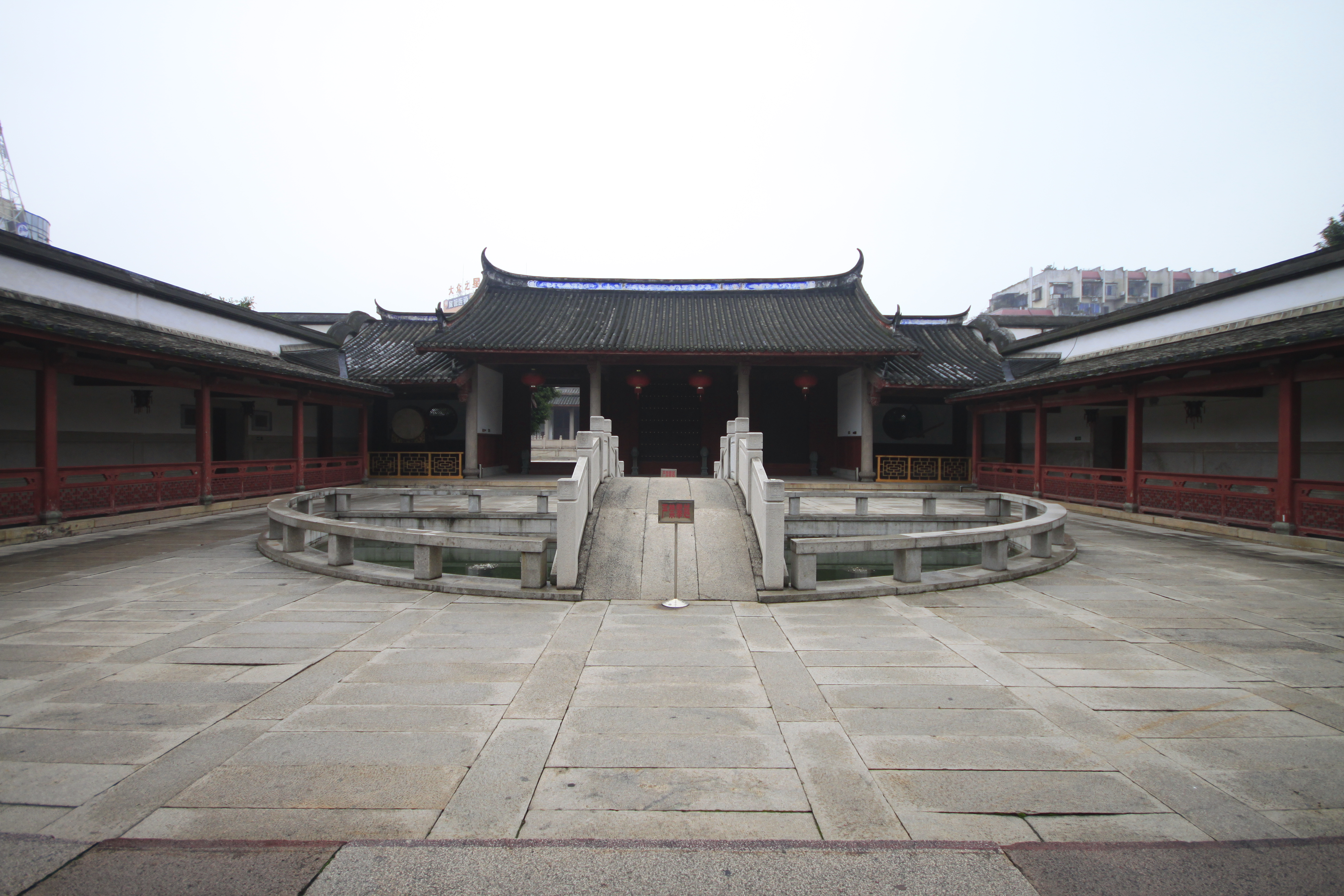 福州文庙，位于中国福建省福州市。